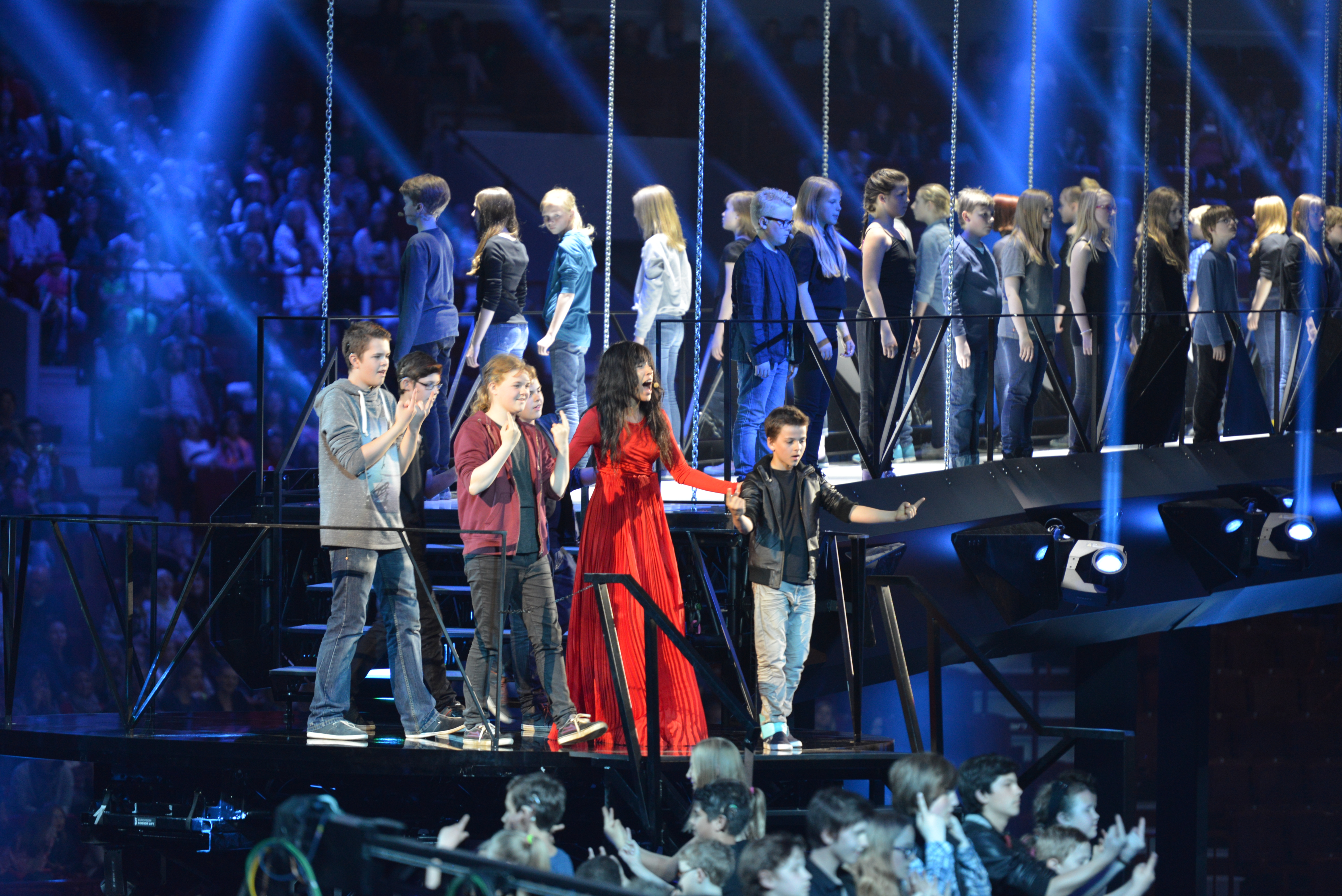 Loreen ESC2013 intro 1